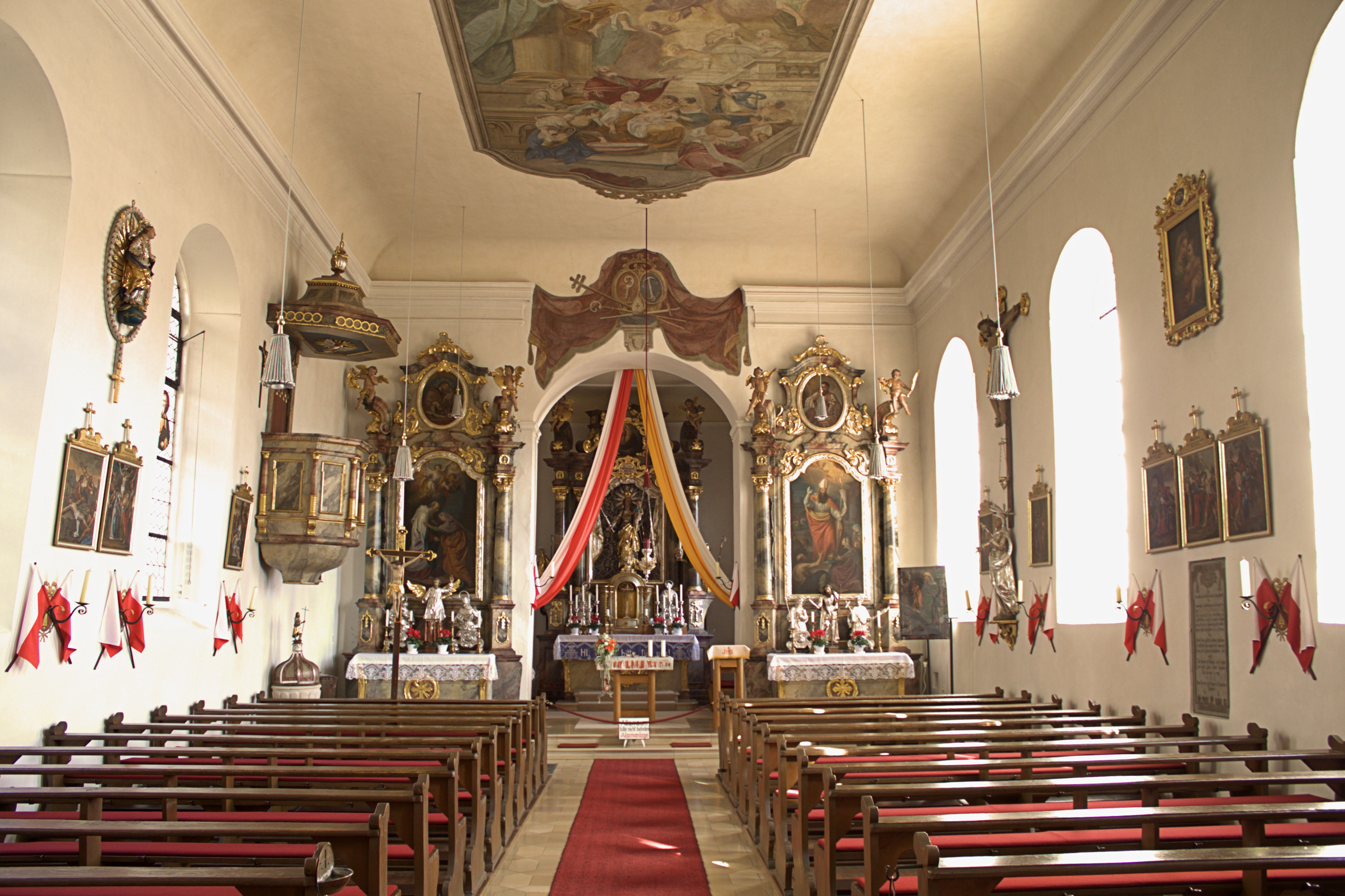 Innenansicht der Wehrkirche Kinding, Landkreis Eichstätt, Bayern